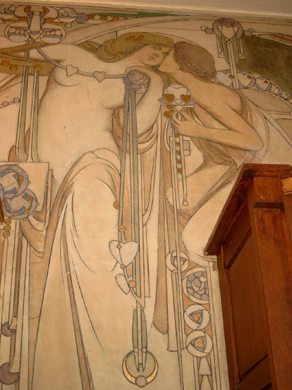 Interieru maison Cauchie, Brussel